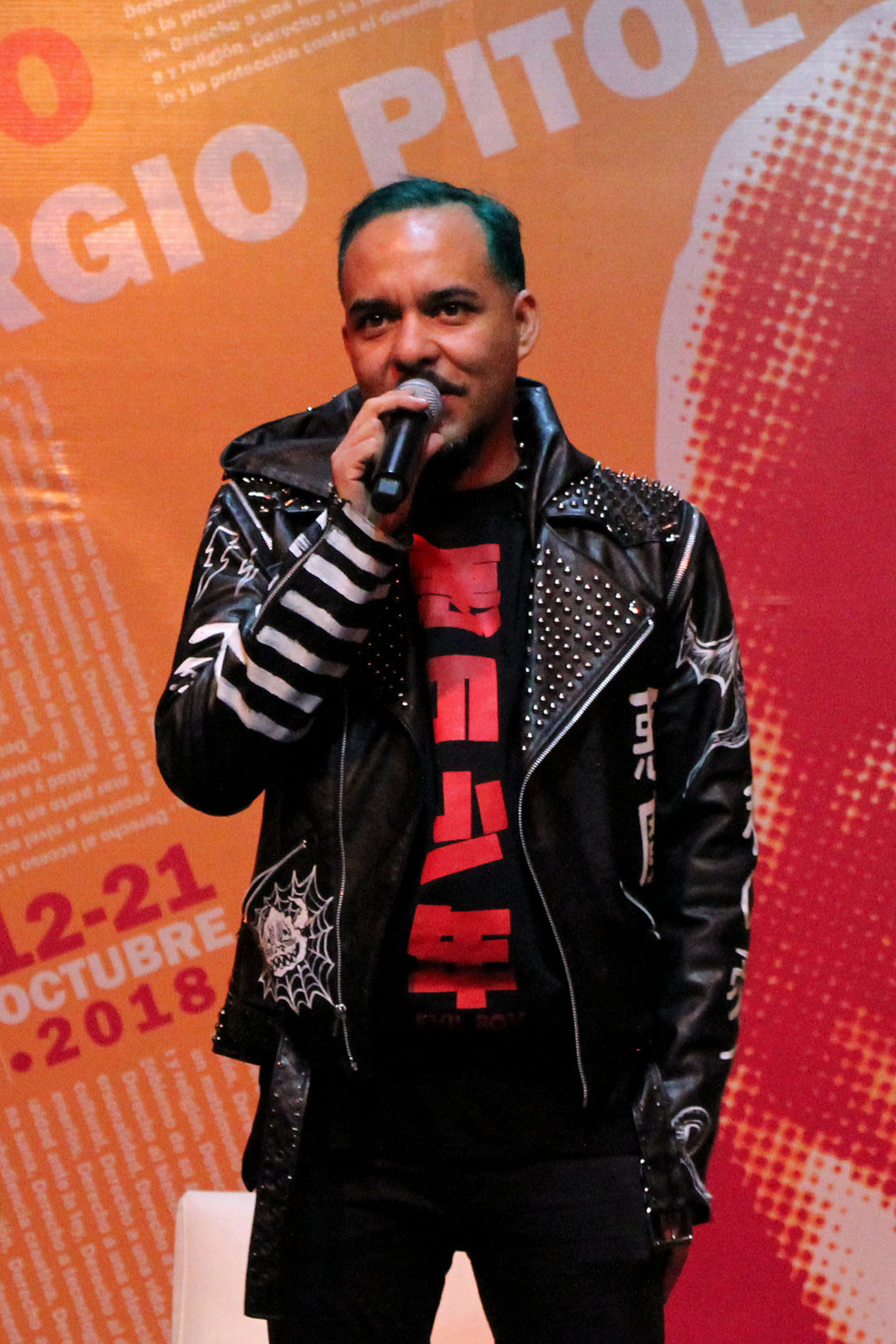 Domingo 21 de octubre del 2018, Hora: 19:00 pm. Se realizó en el Foro Sergio Pitol como parte de la XVIII feria del libro en el Zócalo de la CDMX un concierto-homenaje a 50 años del 68 con Jeny Beaujean, El Abulón y Fratta. Fotografía: LESSING HERNÁNDEZ / Secretaría de Cultura CDMX.